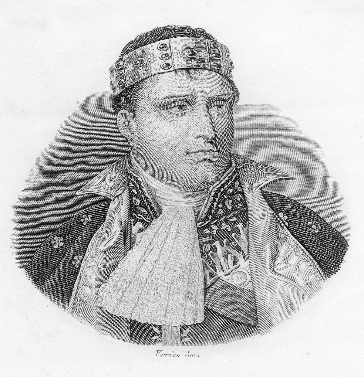 Napoleone in gran costume di Re d'Italia